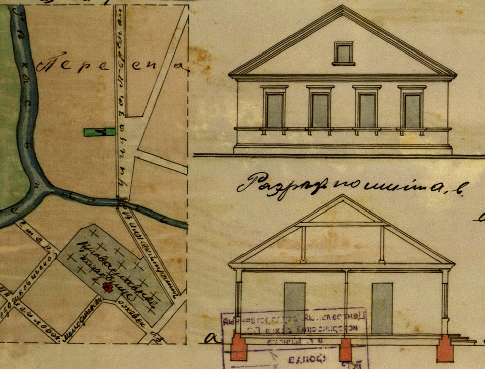 Беларуская (тарашкевіца): Менск (Miensk), Старажоўка (Staražoŭka) і Пярэспа (Piarespa). Дом Бэніяміна Гутмана